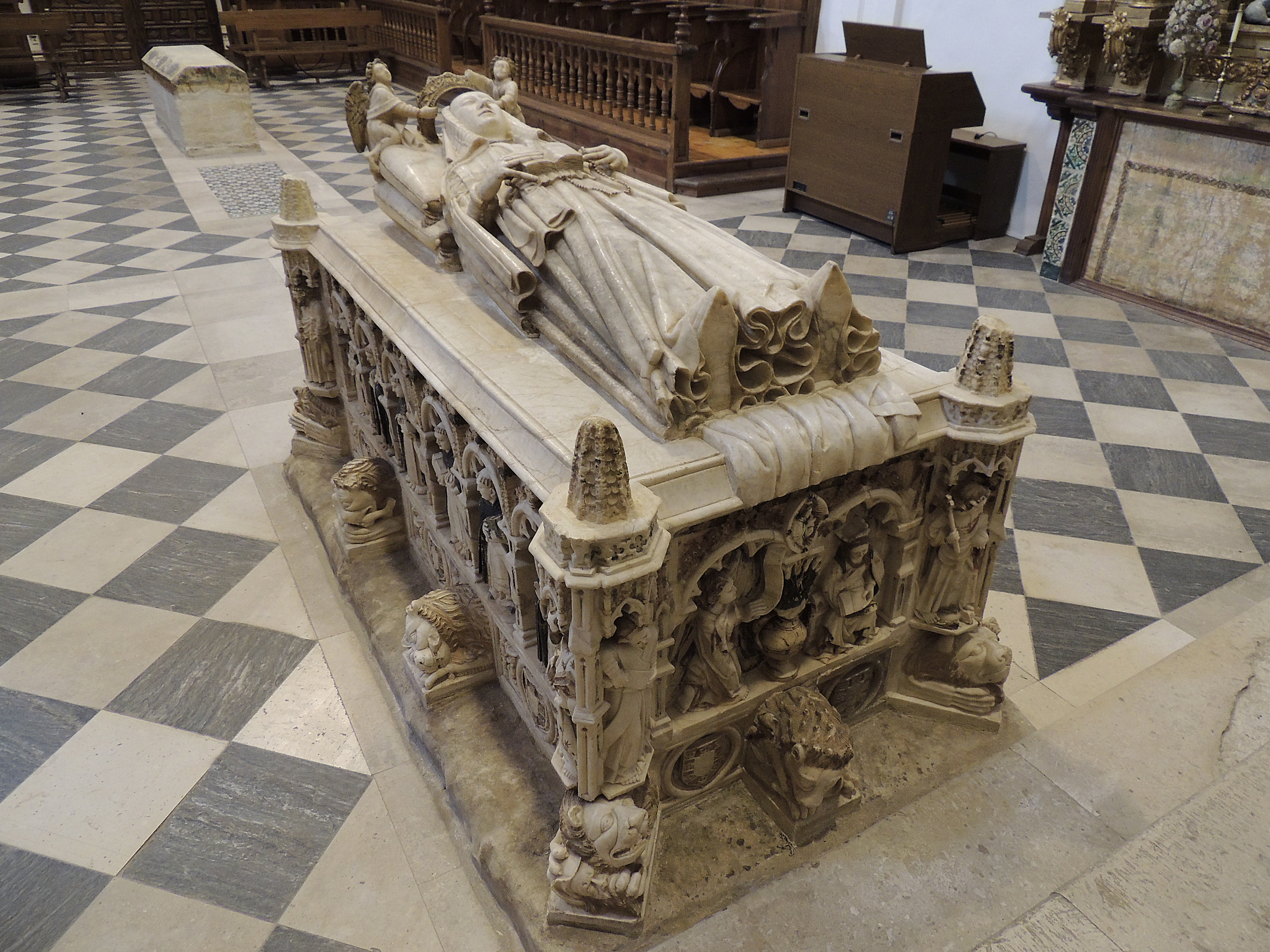 Sepulcro de Beatriz de Portugal en el coro del monasterio del Sancti Spiritus de Toro